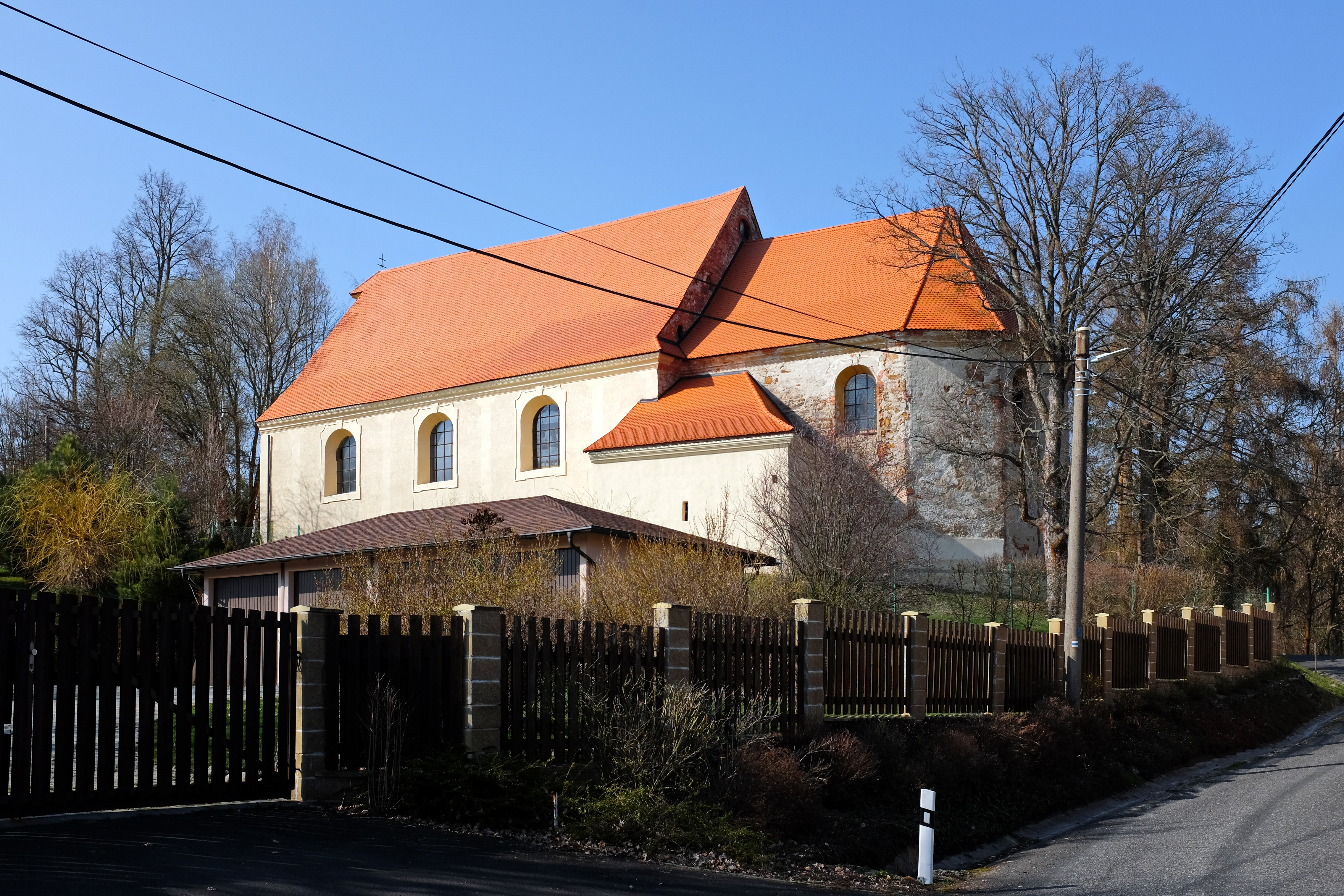 Kostel svatého Wolfganga, Ostroh (Poustka).